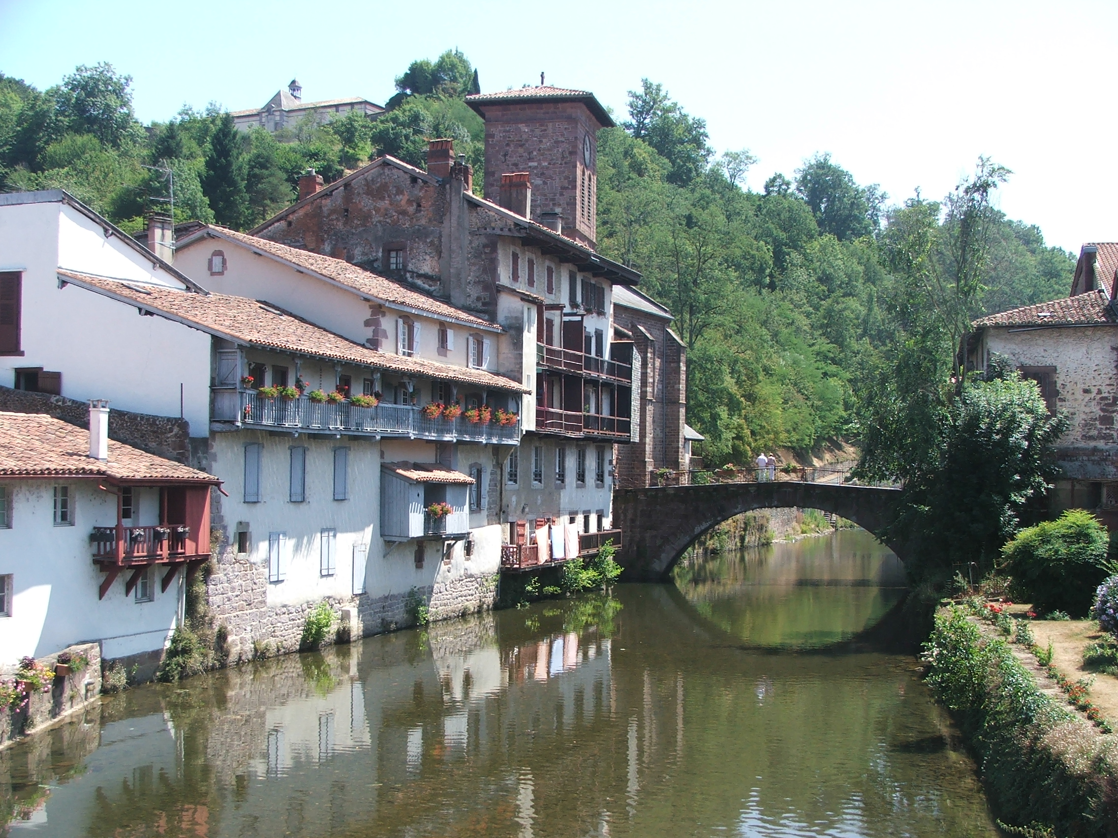 Donibane Garazi, Nafarroa Beherea (Saint-Jean-Pied-de-Port, Basse-Navarre, dép. des Pyrénées-Atlantiques).